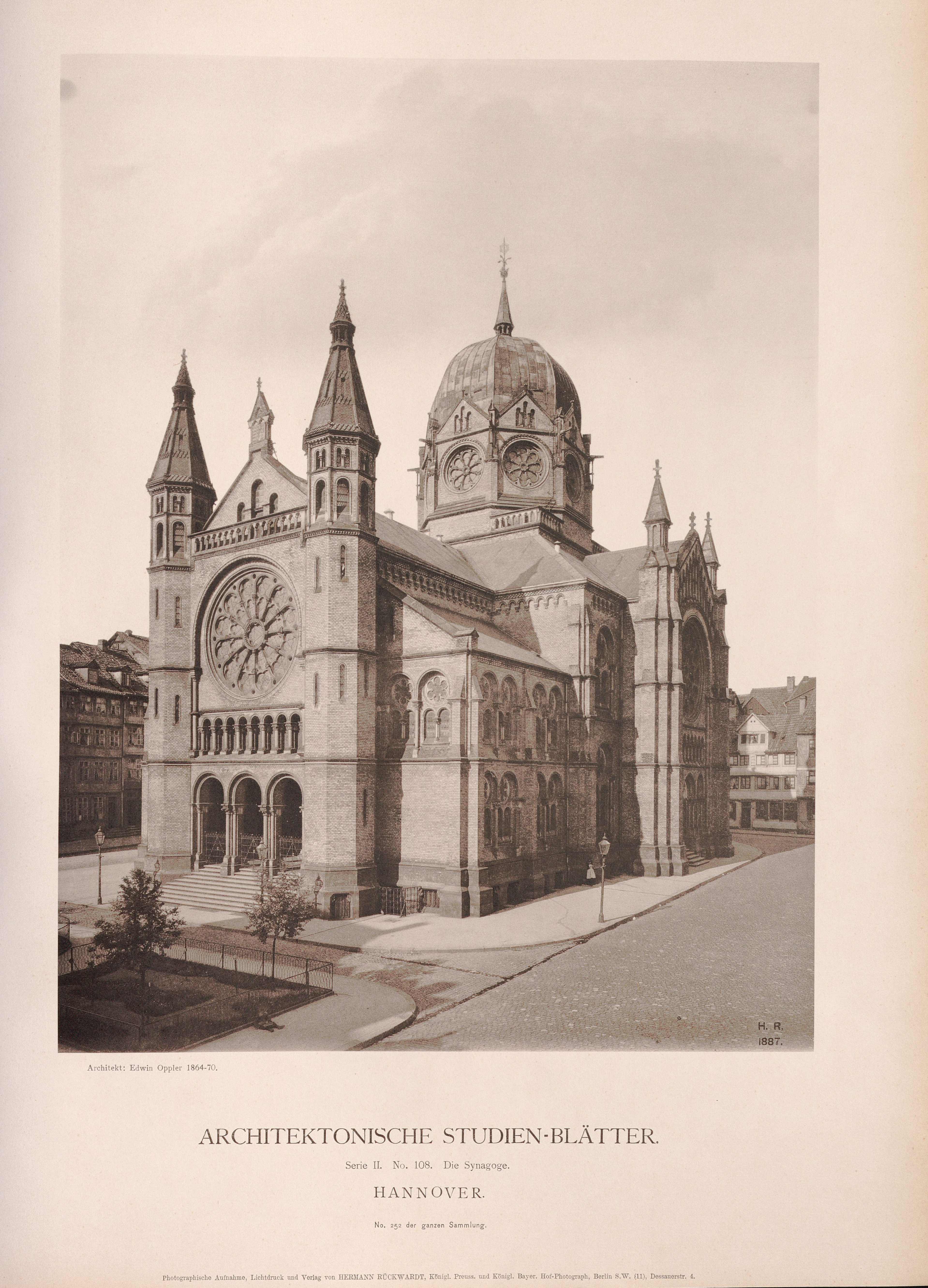 Auf das Jahr 1887 datierte und mit der Künstlersignatur von Hermann Rückwardt (H. R.) signierter Lichtdruck vom Gebäude der von dem Architekten Edwin Oppler erbauten Neuen Synagoge an der Bergstraße in Hannover. Die Aufnahme wurde im Lichtdruck vervielfältigt und erhielt in in der Serie II der Architektonischen Studien-Blätter die fortlaufende Numer 108 beziehungsweise die Nummer 252 der ganzen Sammlung ...